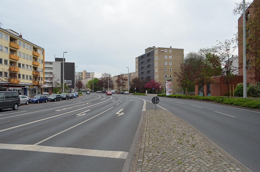 Braunschweig, Güldenstraße: Blickrichtung Süden. Dort, wo sich das rote Fahrzeug befindet, war etwa vor 1945 der Südklint.